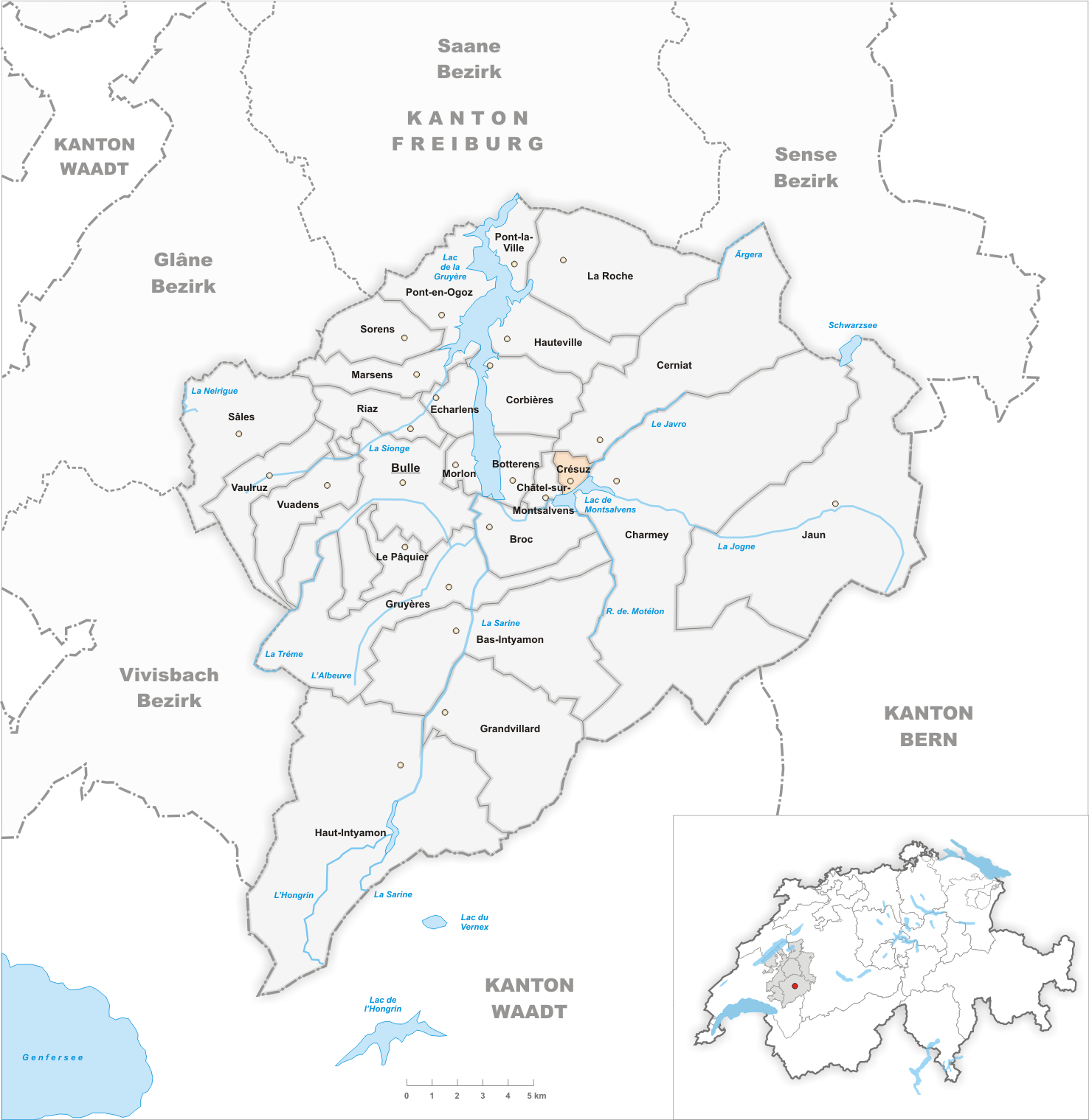 Municipality Crésuz